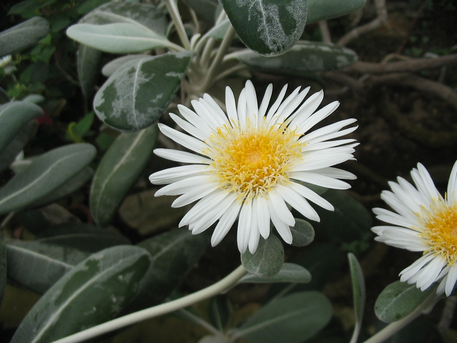 Pachystegia insignis - Blüte - Bot. Garten Berlin Dahlem